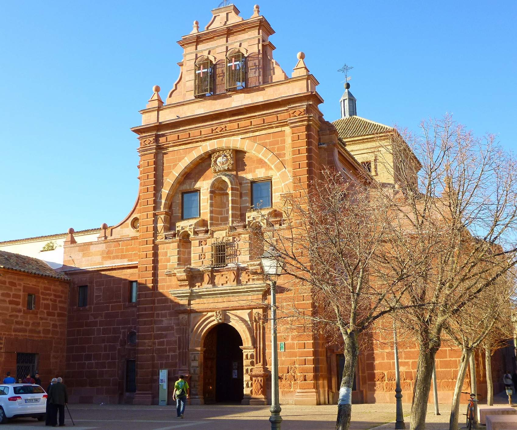 Iglesia de la Santísima Trinidad (Alcázar de San Juan, Ciudad Real)